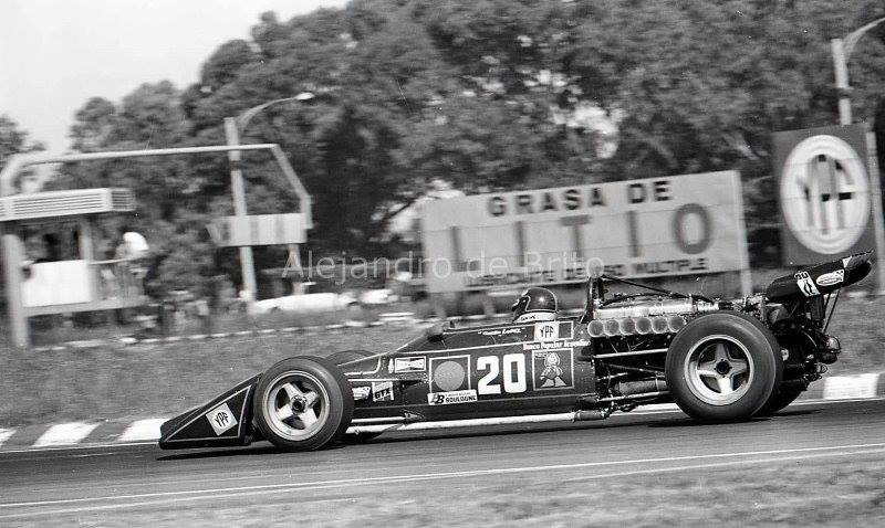 Osvaldo Abel "Cocho" López (Formisano-Tornado), F1MA 1973.